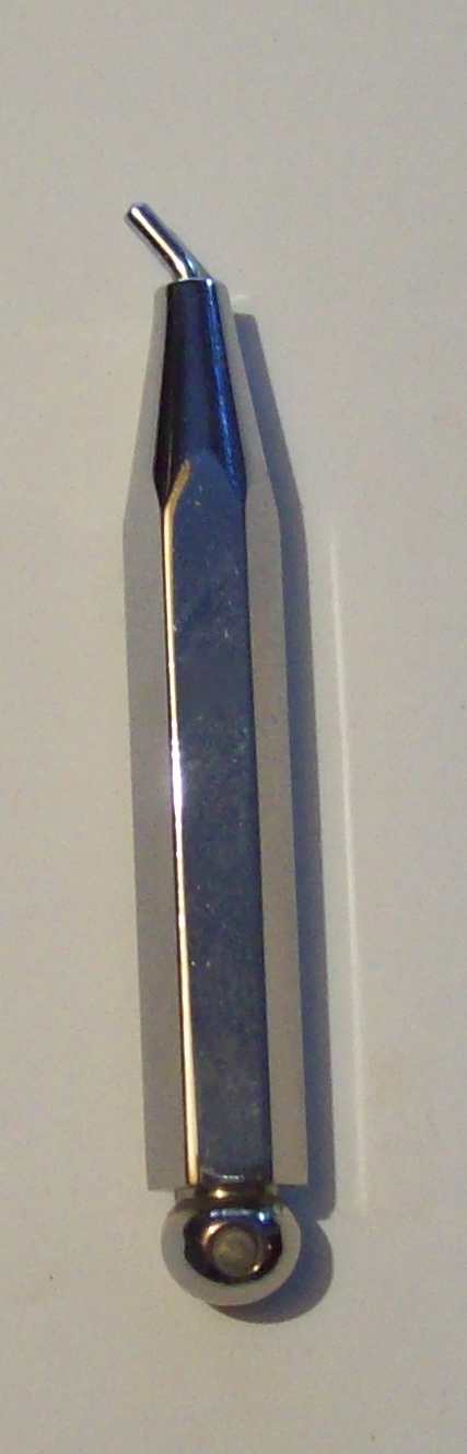 Kinnhalterschlüssel für Violine oder Viola